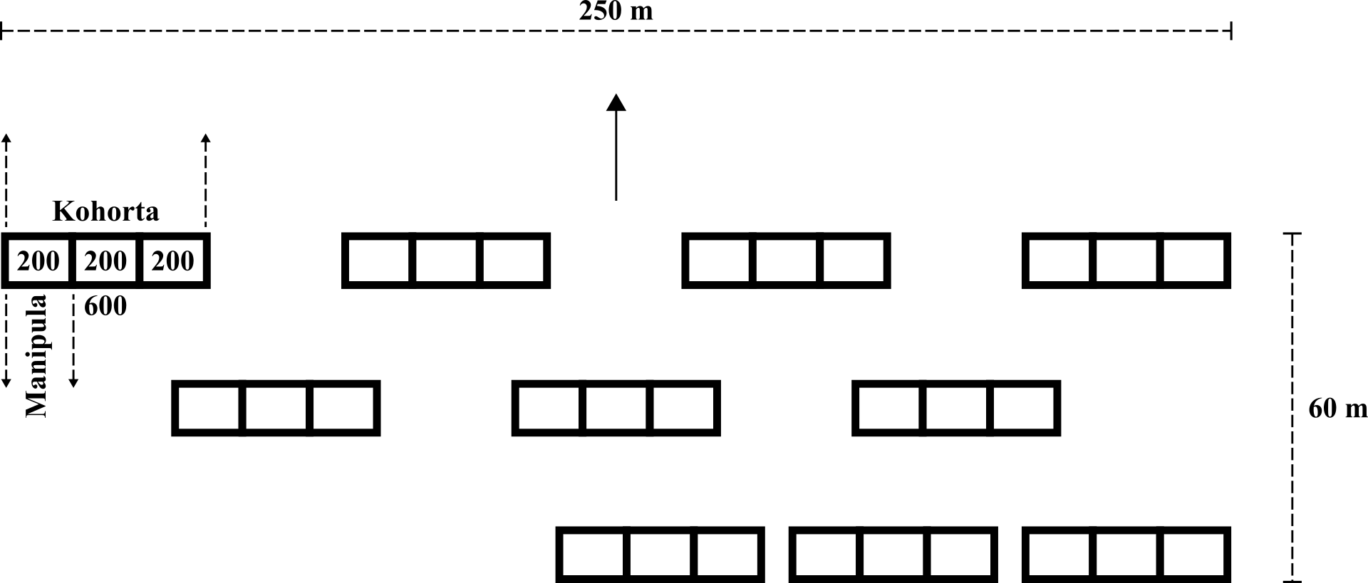 Grafički prikaz borbenog rasporeda falange kohorti.